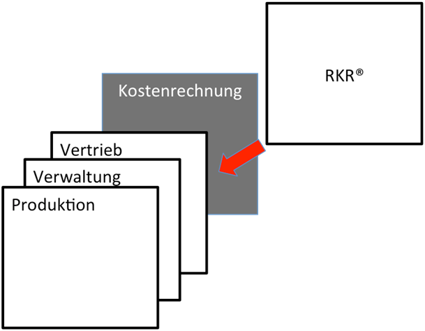 Einordnung der Ressourcenkostenrechnung in die Ebenen eines Unternehmens